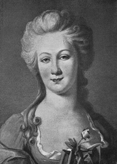 Lili Schöneman(1758-1817) Goethes Verlobte. Pastellbild in Privatbesitz. Lili verlobte sich der junge Advokat Goethe zur Ostermesse 1775 nach einem Winter gesellschaftlichen Vergnügens und Mißvergnügens. Sie war die Tochter des Bankierswitwe Schönemann, geb. d'Orville. Trotz gegenseitiger starker Zuneigung konnte Goethe das Band nicht tragen. Spiegel seiner Liebe wurden seine Briefe an die Gräfin Stolberg und seine Liligedichte. In seinem letzten Briefe an Lili vom 14. Dezember 1807 gedachte Goethe der Tage, "die ich unter die glücklichsten meines Lebens zähle".